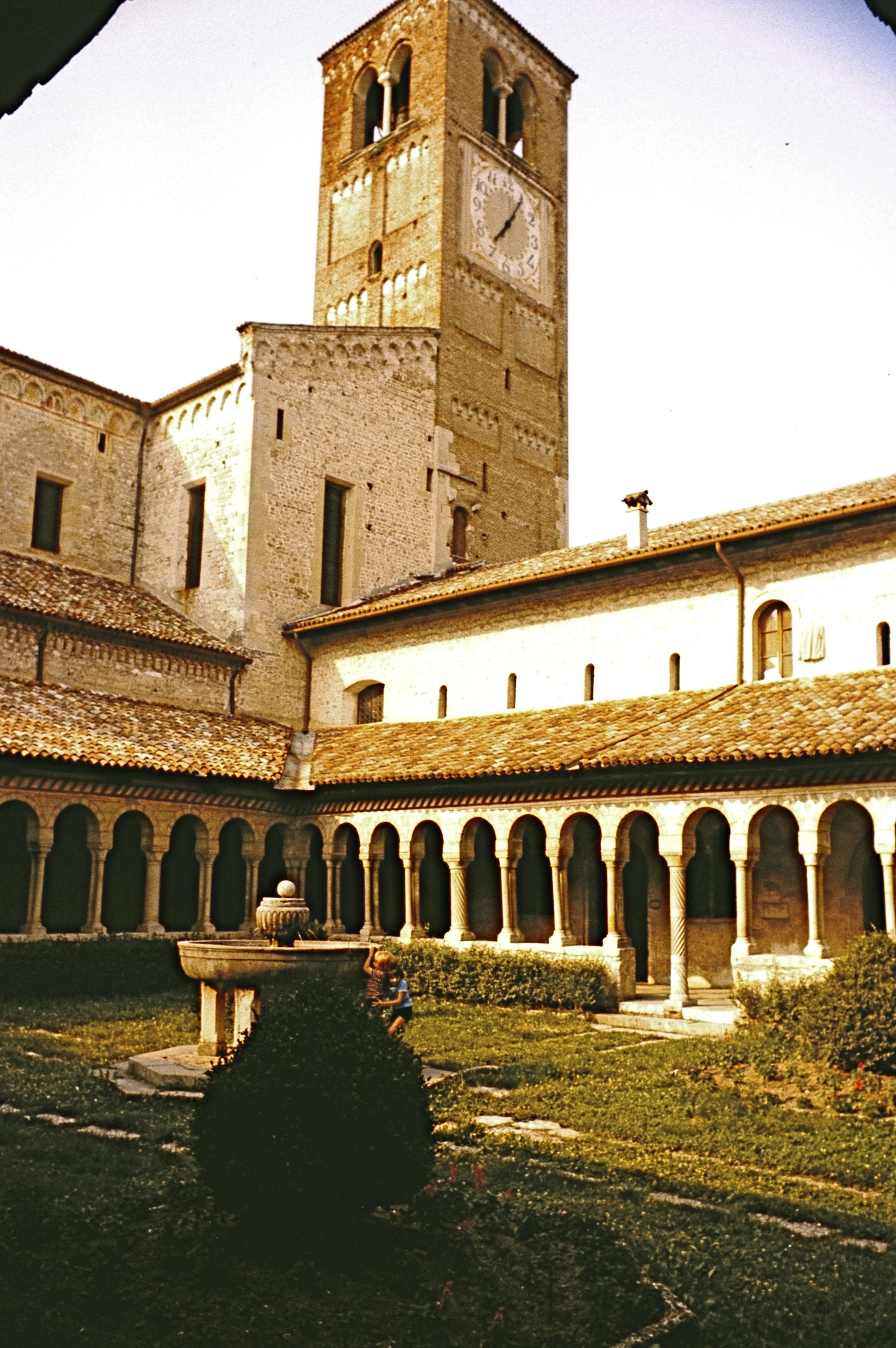 Chiostro, Chiesa e torre campanaria